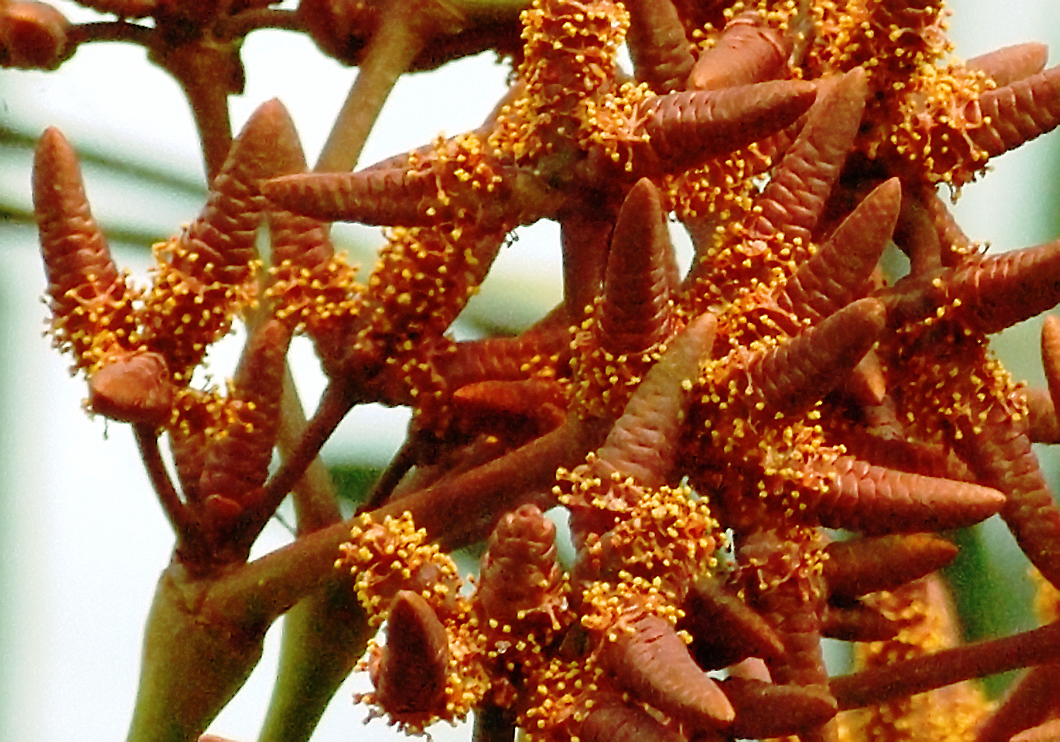 Ogród Botaniczny w Poznaniu, welwiczia przedziwna, (kwiatostan rośliny rodzaju męskiego); Botanical garden in Poznań, Welwitschia mirabilis (male with inflorescence)